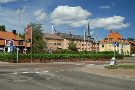 Ansicht von Mora mit Tourismusbüro, rechts (gelbes Haus)